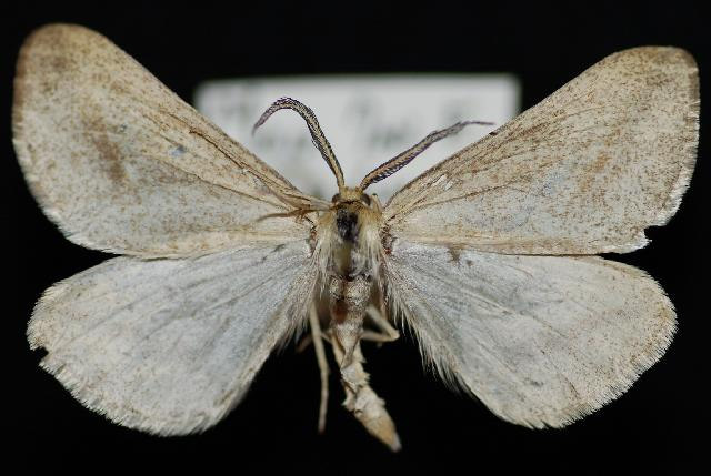 Aspitates aberrata